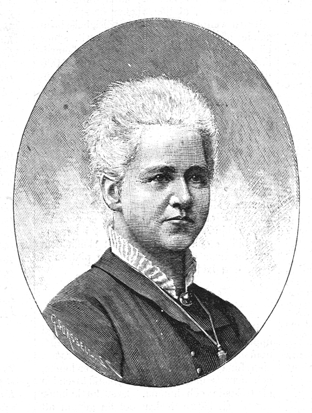 Lina Norwall